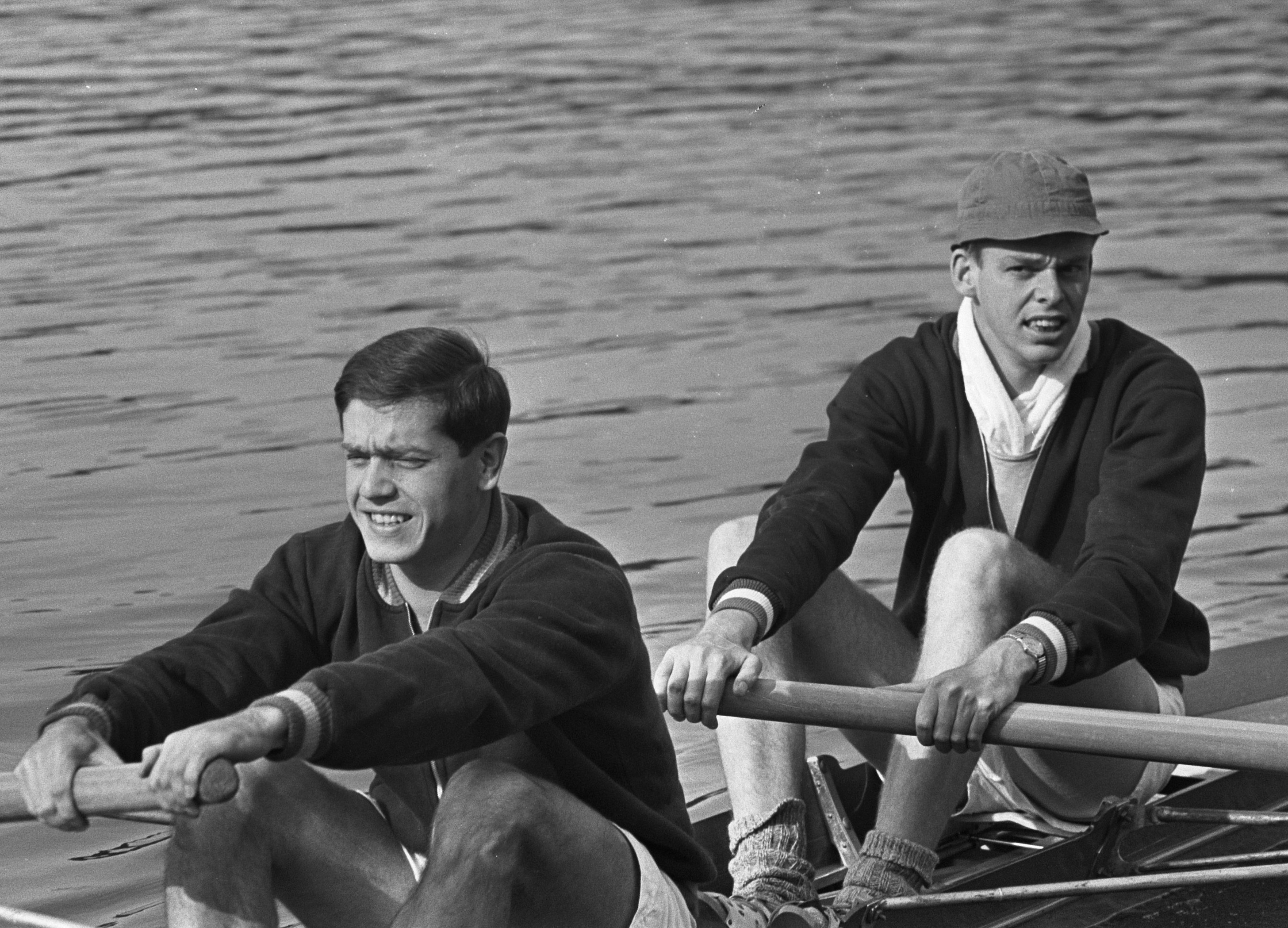 Europese Roeikampioenschappen 1a. Nederlandse vier zonder stuurman 2a. Nederlandse enkel twee, Enters-Boelen /